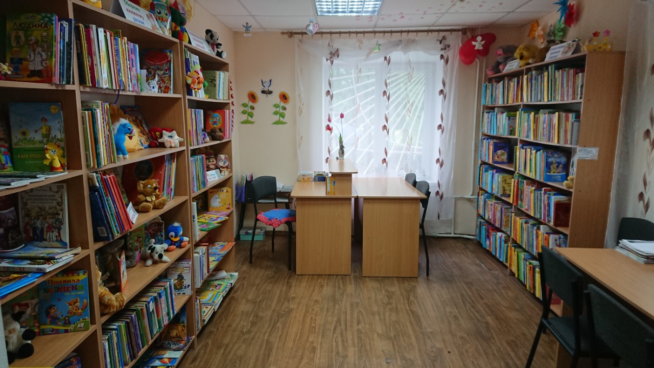 Дитячий відділ